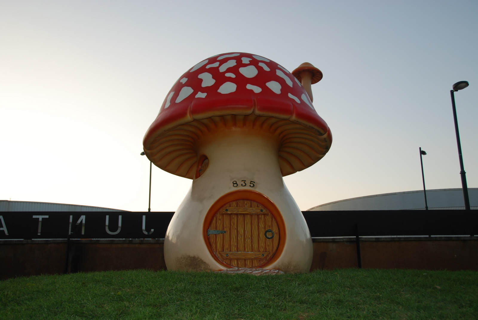 Una reproducció de la casa de David el Gnomo al Parc Francesc Macià II de Malgrat de Mar.